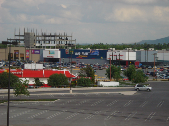 Wal-Mart de San Luis Potosí México.